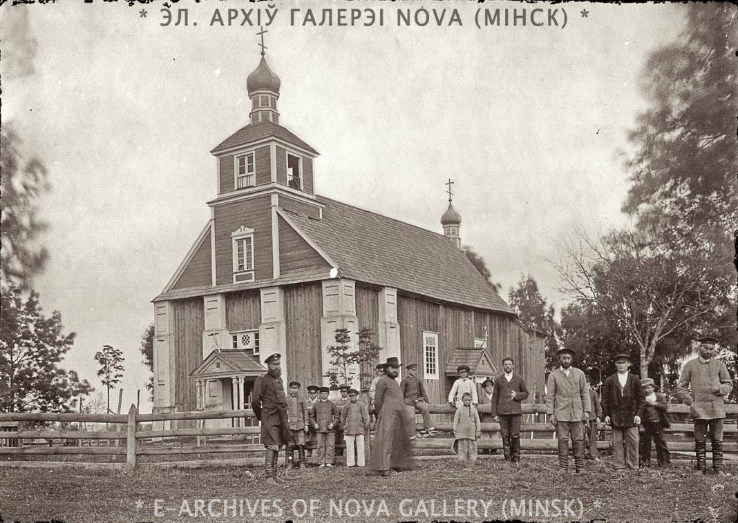 Беларуская (тарашкевіца): Нягневічы (Niahnievičy). Царква